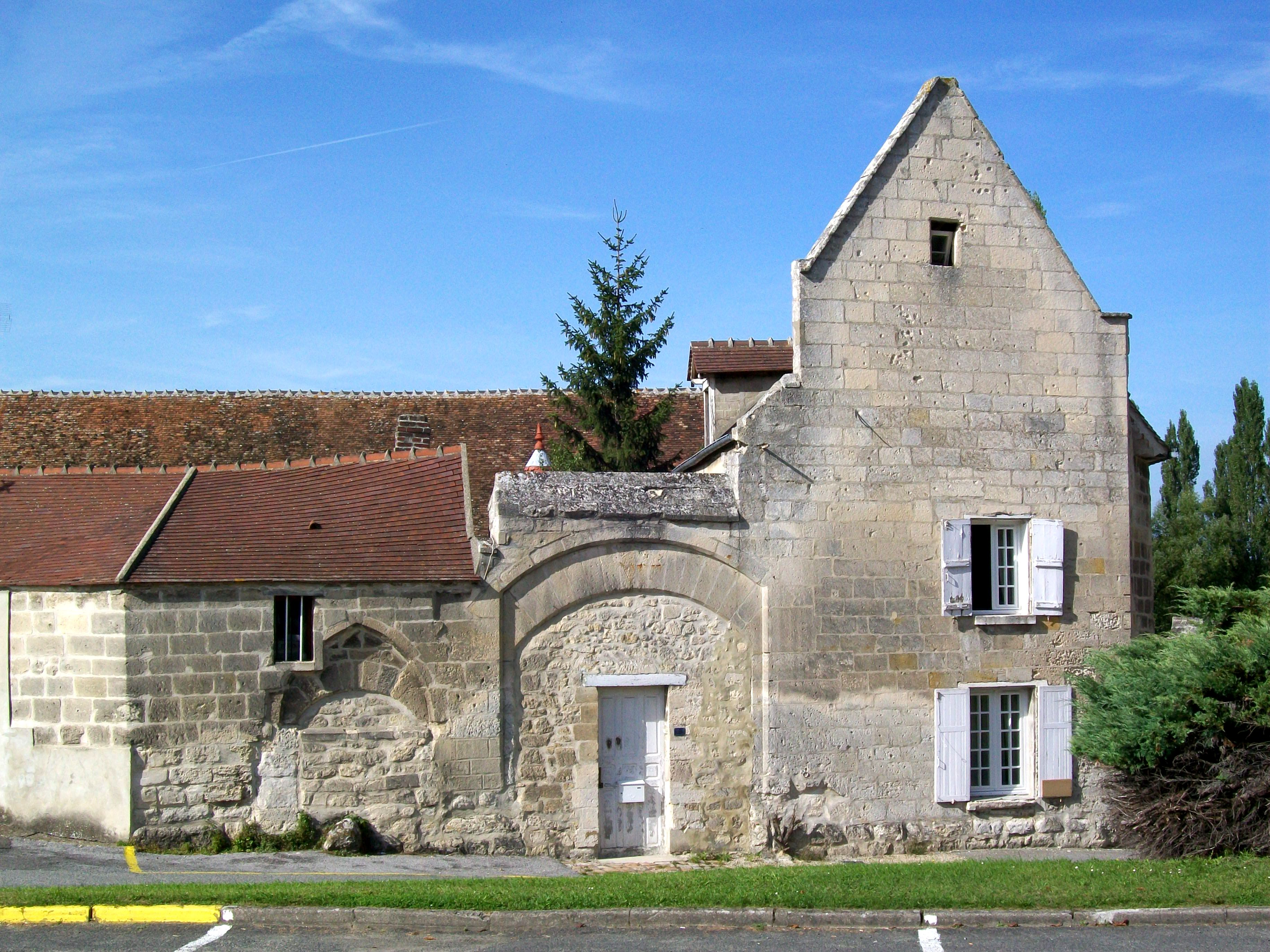 Le logis de la ferme de l'abbaye du Moncel, façade sur la RD 123 (rue du Moncel). Ce bâtiment date de la même époque que la grange dîmière, mais ne fait pas partie des éléments inscrits au titre des monuments historiques.